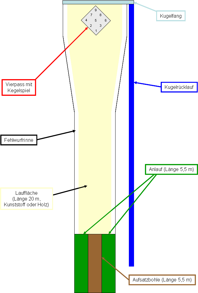 Dies ist eine manuelle, selbsterstellte Skizze einer Scherenbahn. Sportkegeln auf Scherenbahnen wird in Deutschland hauptsächlich in Hessen, Rheinland-Pfalz, Saarland, Nordrhein-Westfalen und Süd-Niedersachsen gespielt.